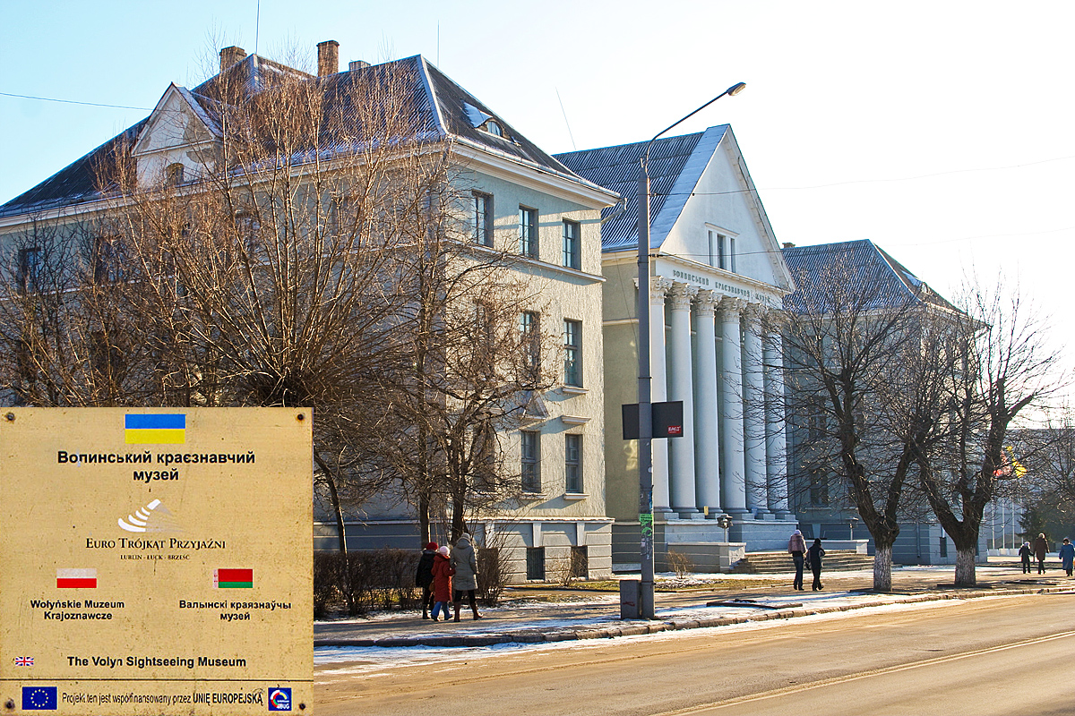 The Volyn Sightseeing Museum in Lutsk